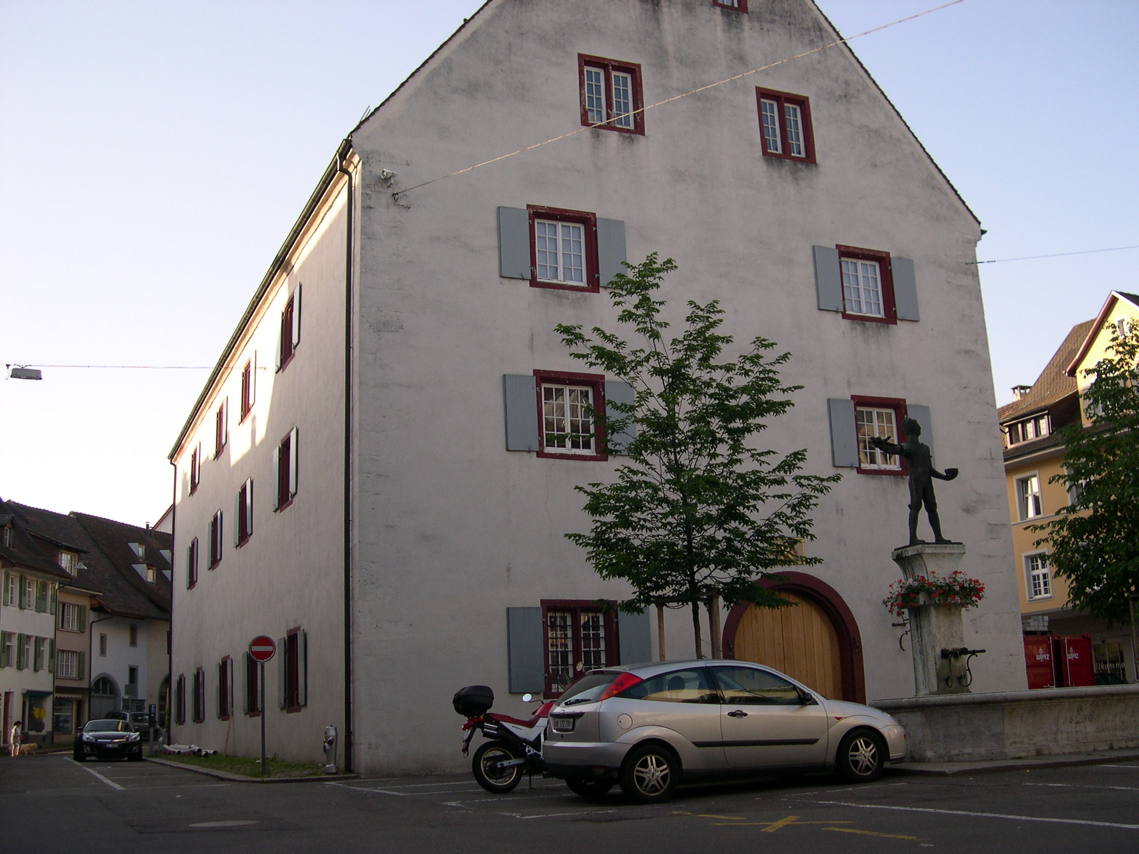 Das Baselbieter Kantonsmuseum («Museum.BL») in Liestal, Basel-Landschaft, Schweiz.